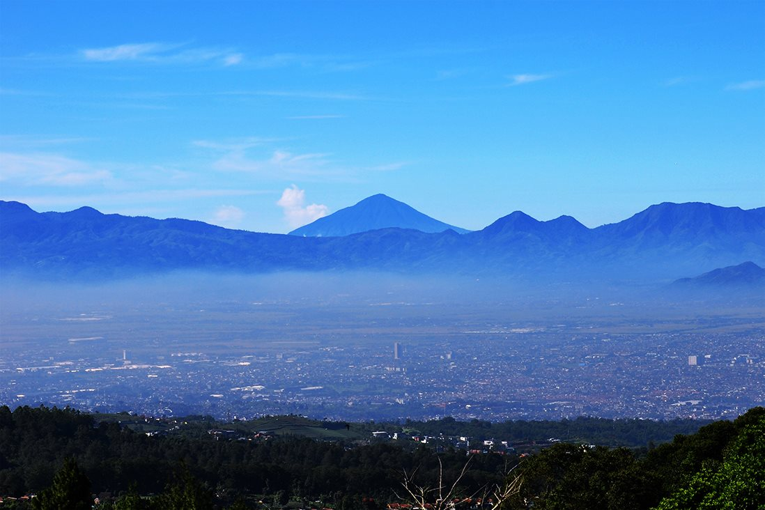 Bandung Basin, this photo taken from Gunung Batu in North Bandung.